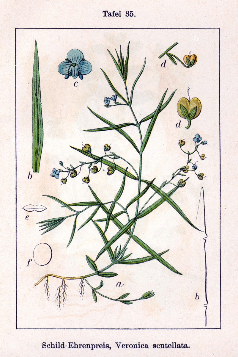 Veronica scutellata L. Original Description Schild-Ehrenpreis, Veronica scutellata